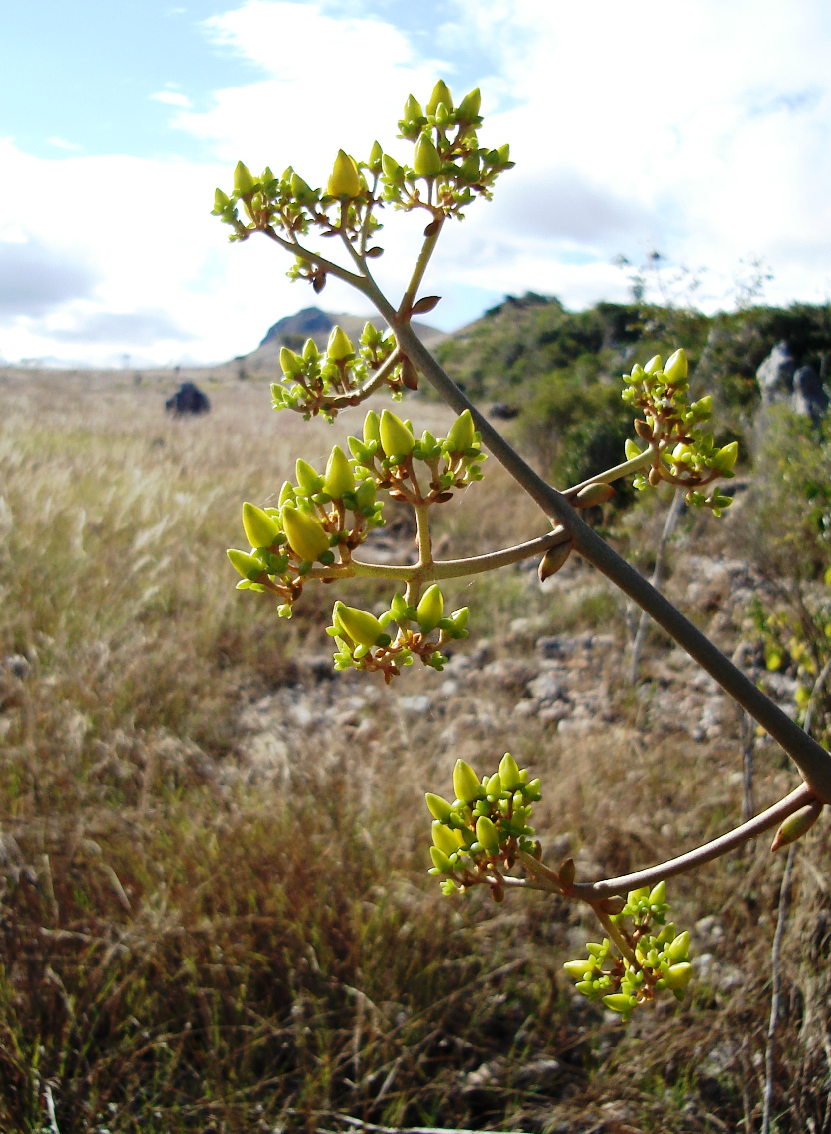 Kalanchoe orgyalis, nordöstlich Ihosy, Madagaskar, Standort 22°17,813′S 46°16,800′E, Detailaufnahme der Blüte